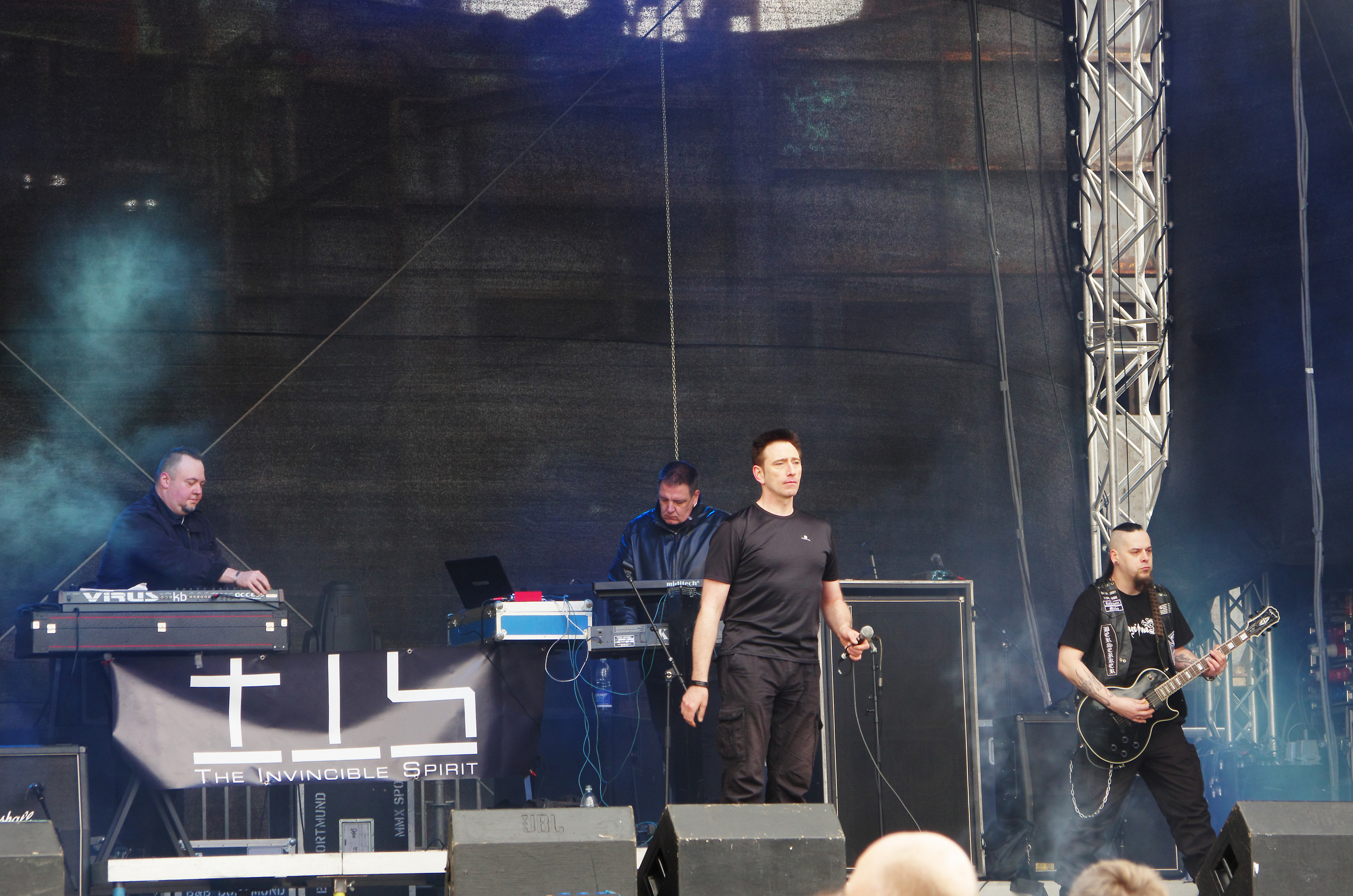 Auftritt bei Rock in den Ruinen 2013 in Dortmund.